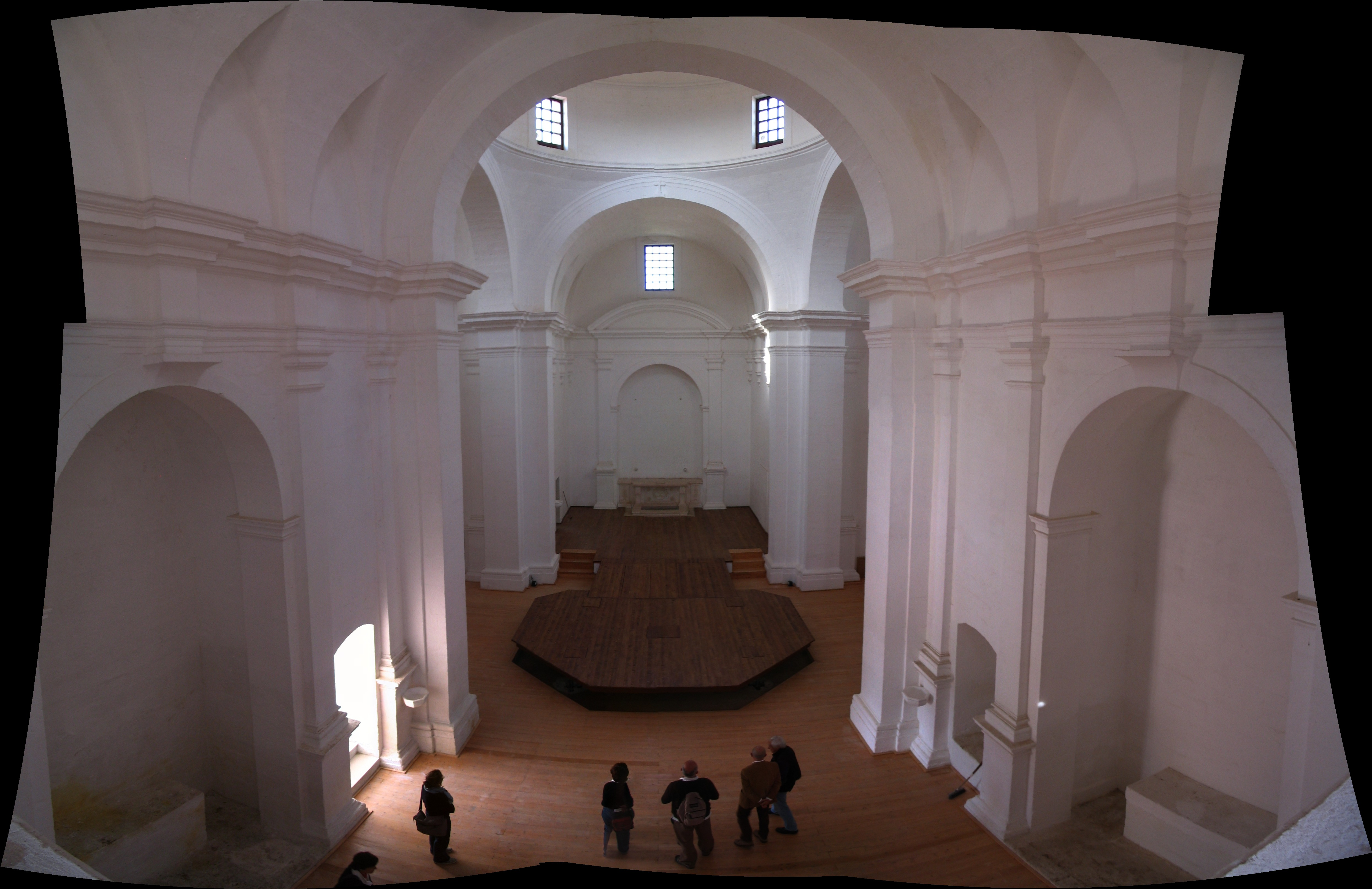 interno di Cristo delle zolle Monopoli (BA) dopo i restauri, con palcoscenico idraulico sollevato